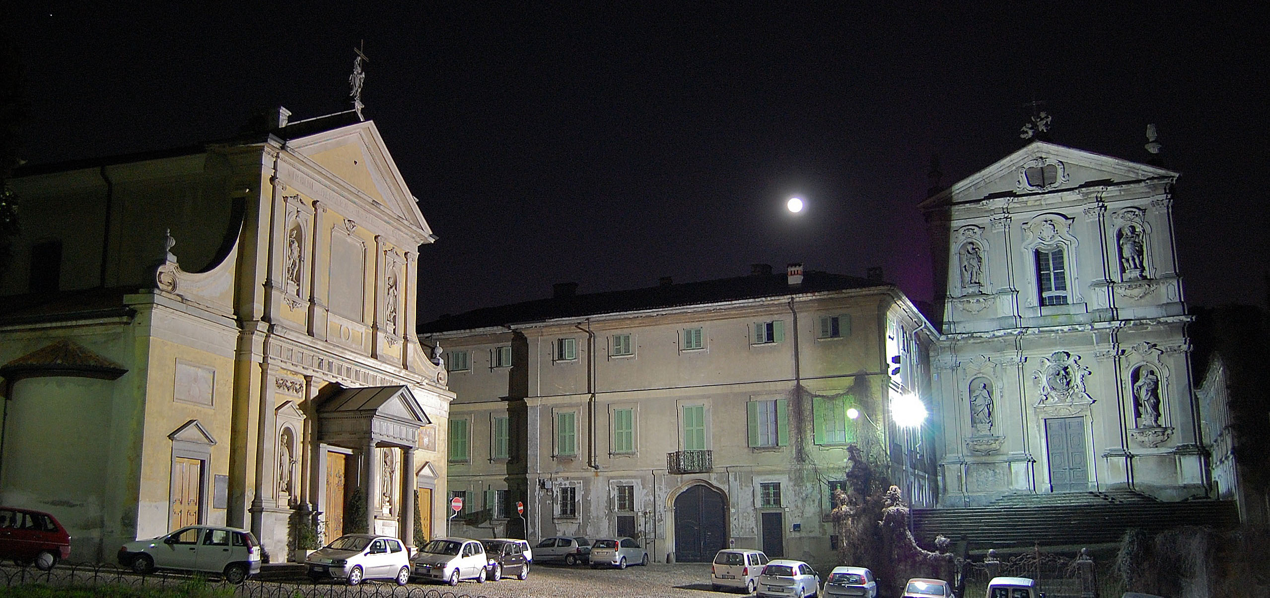 Chiesa di San Vittore e piazza antistante a Meda (MB)